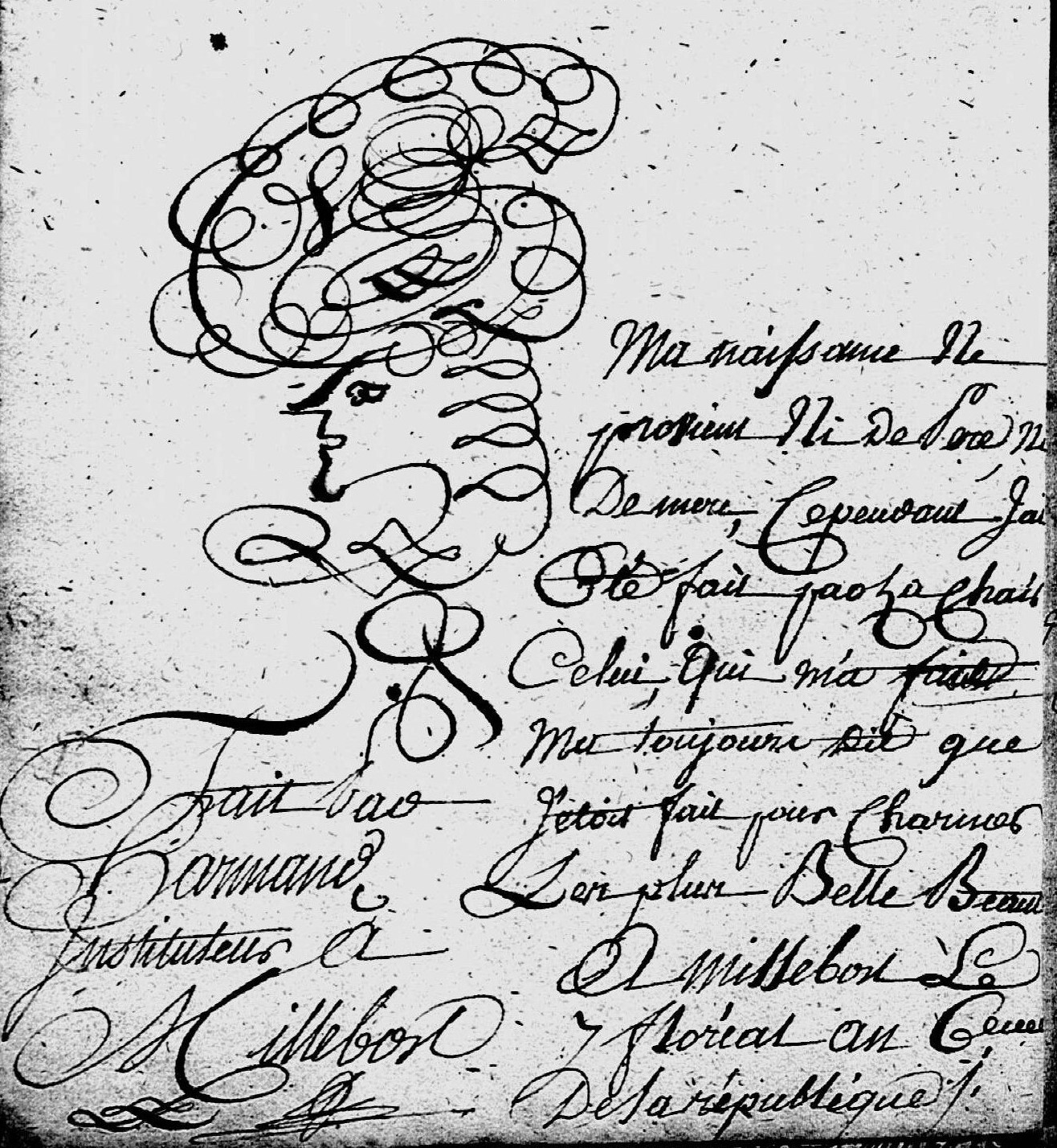 HARMAND premier instututeur